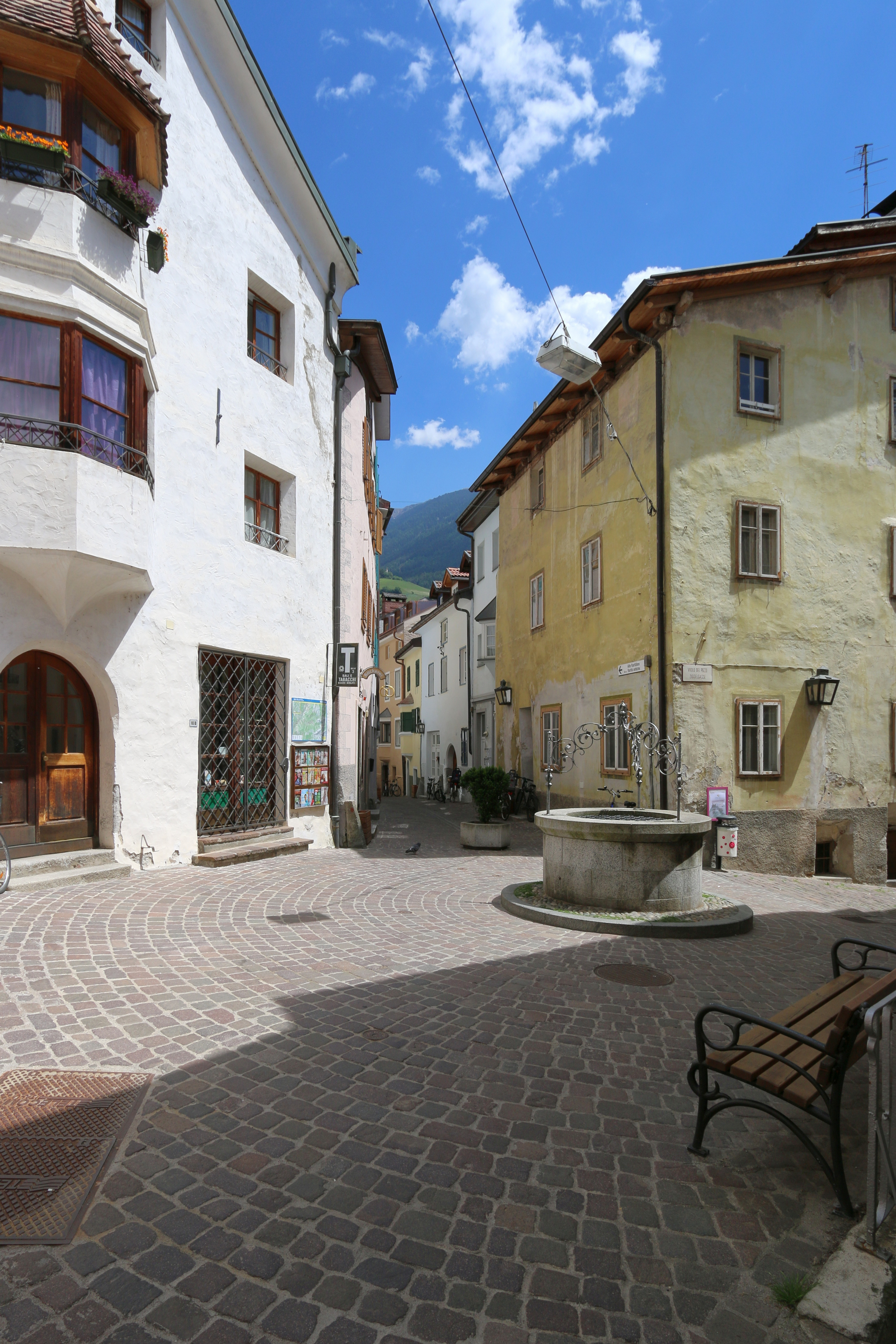 Brixen, Südtirol: Brunnen am Ziggelplatz